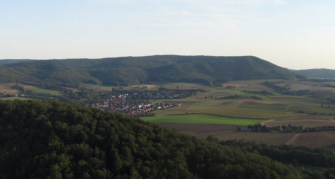 Blick vom Großen Leuchtberg über Oberdünzebach bis zum Schlierbachswald (mit dem Hundsrück in der Mitte und dem Lotzenkopf rechts)